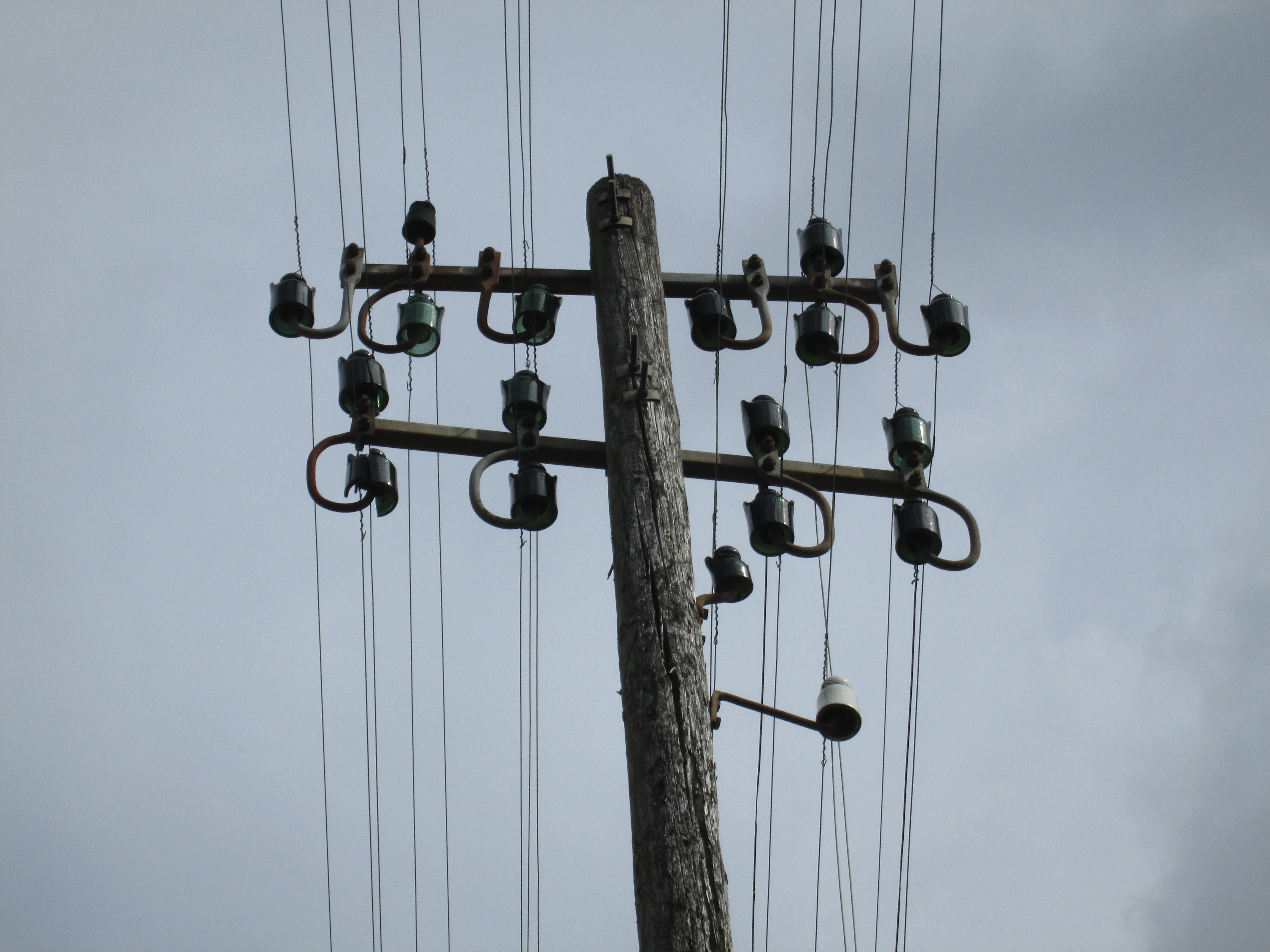 Photographie d'un poteau de téléphone avec conducteurs nus sur isolateurs pour liaisons grandes distances.